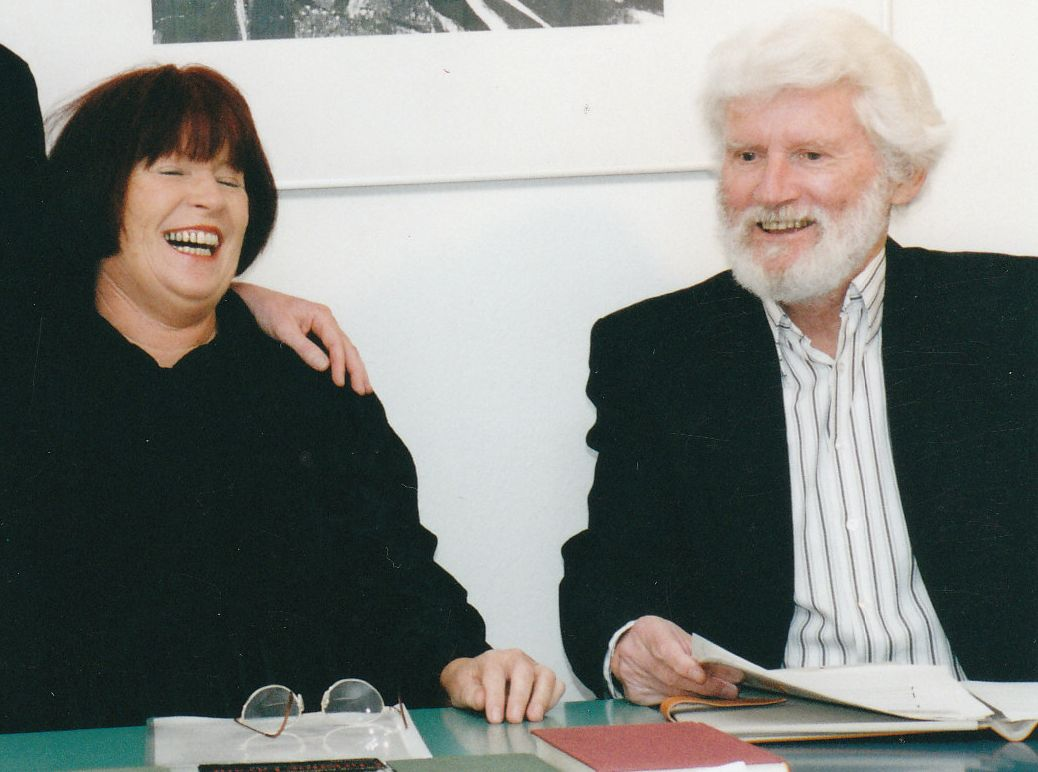 Heinz Gerstinger mit seiner Frau Erika Santner, Lesung aus Werken von Christine Lavant im Kulturkabinett in Floridsdorf, Wien, Veranstalter: Kulturverein Transdanubien, 25.9.1998.